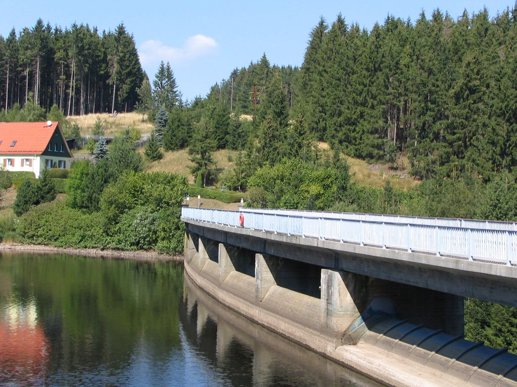 Staumauer der Talsperre Königshütte photographiert am 31.08.2005